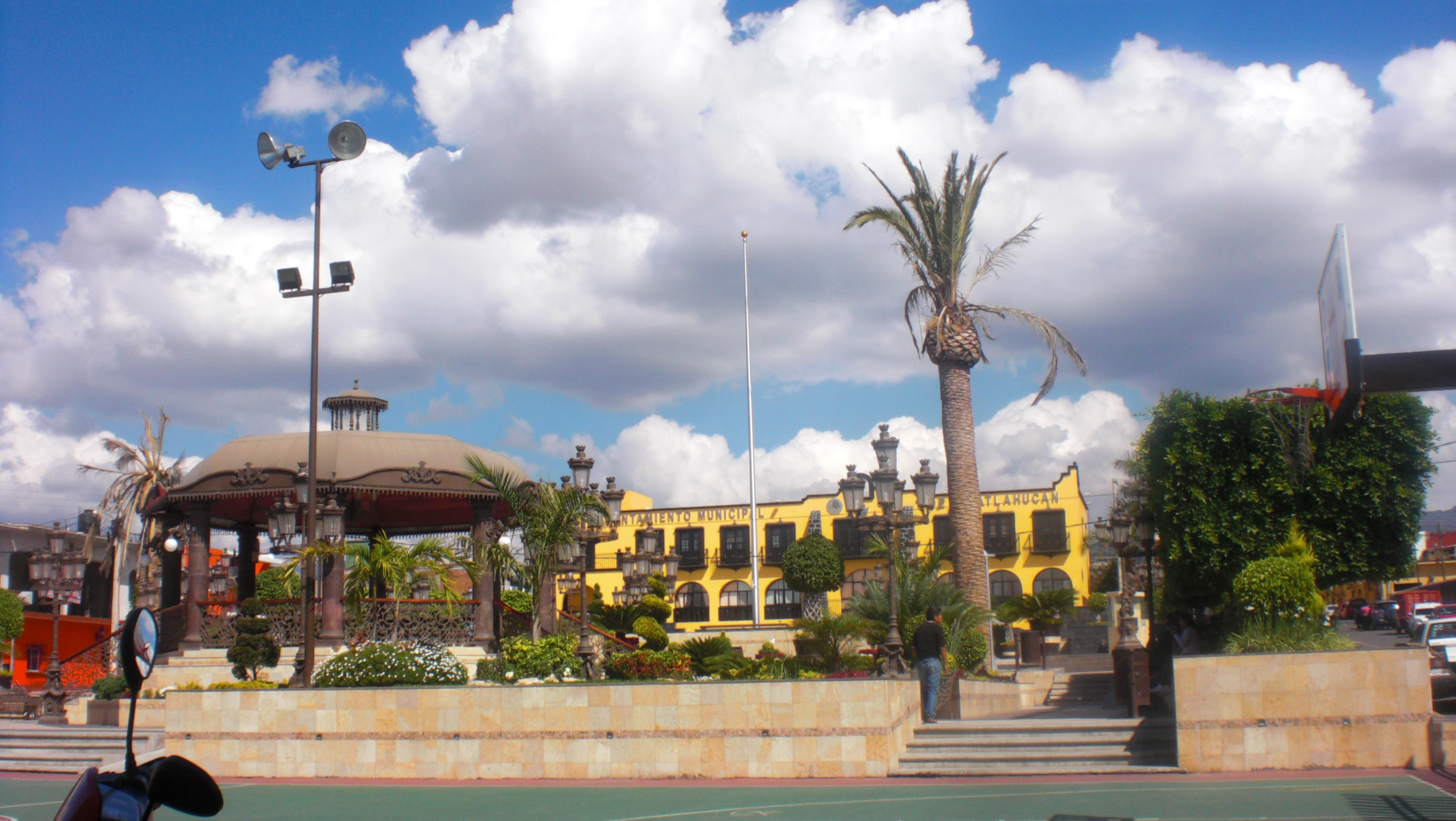 Remodelada Plaza De Armas Atlatlahucan Morelos